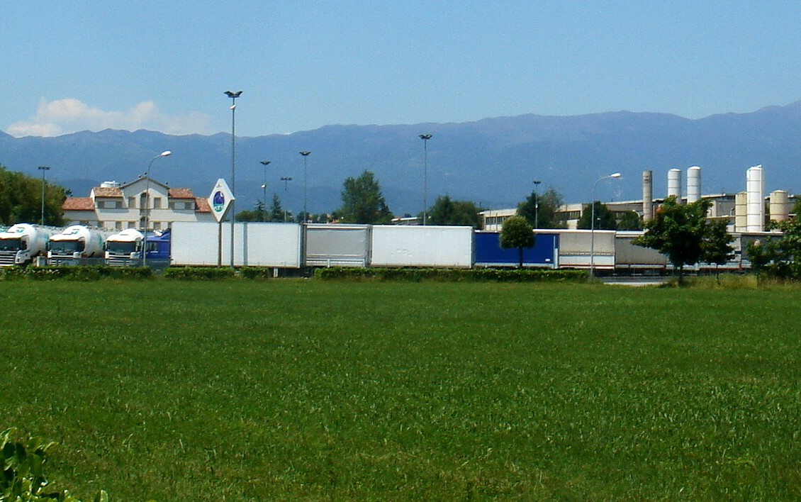 Castello Roganzuolo (San Fior, Treviso, Italia): la settecentesca Villa Liccer negli anni '70 è stata vittima dell'edilizia industriale, che l'ha inghiottita: in quella che fino alla prima metà del Novecento era la tenuta dell'elegante villa sorgono capannoni e il parcheggio degli automezzi, l'impatto ambientale dei quali, in pochi anni, ha reso irriconoscibile l'assetto territoriale che nei secoli si era costituito. Neorestaurata (2008/9), la villa ha riacquistato parte dello splendore originario.